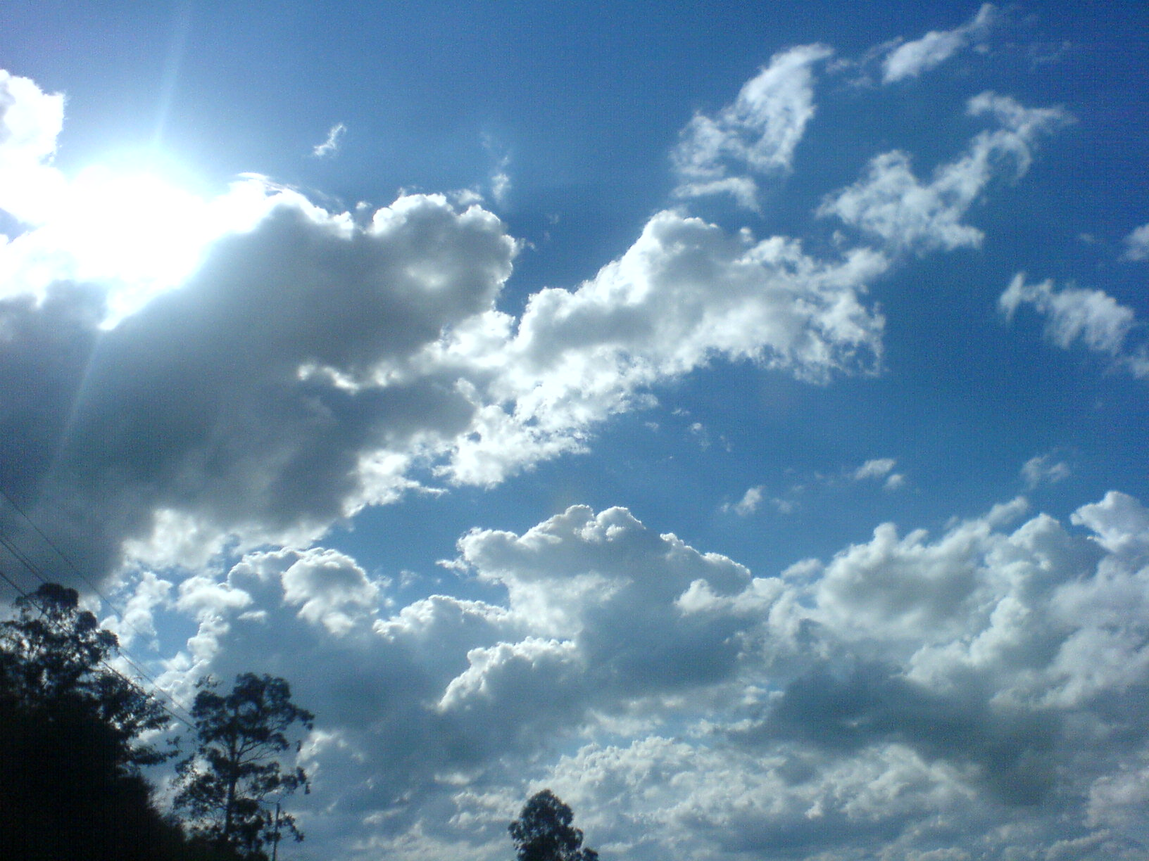 Céu azul com nuvens brancas com raios do sol